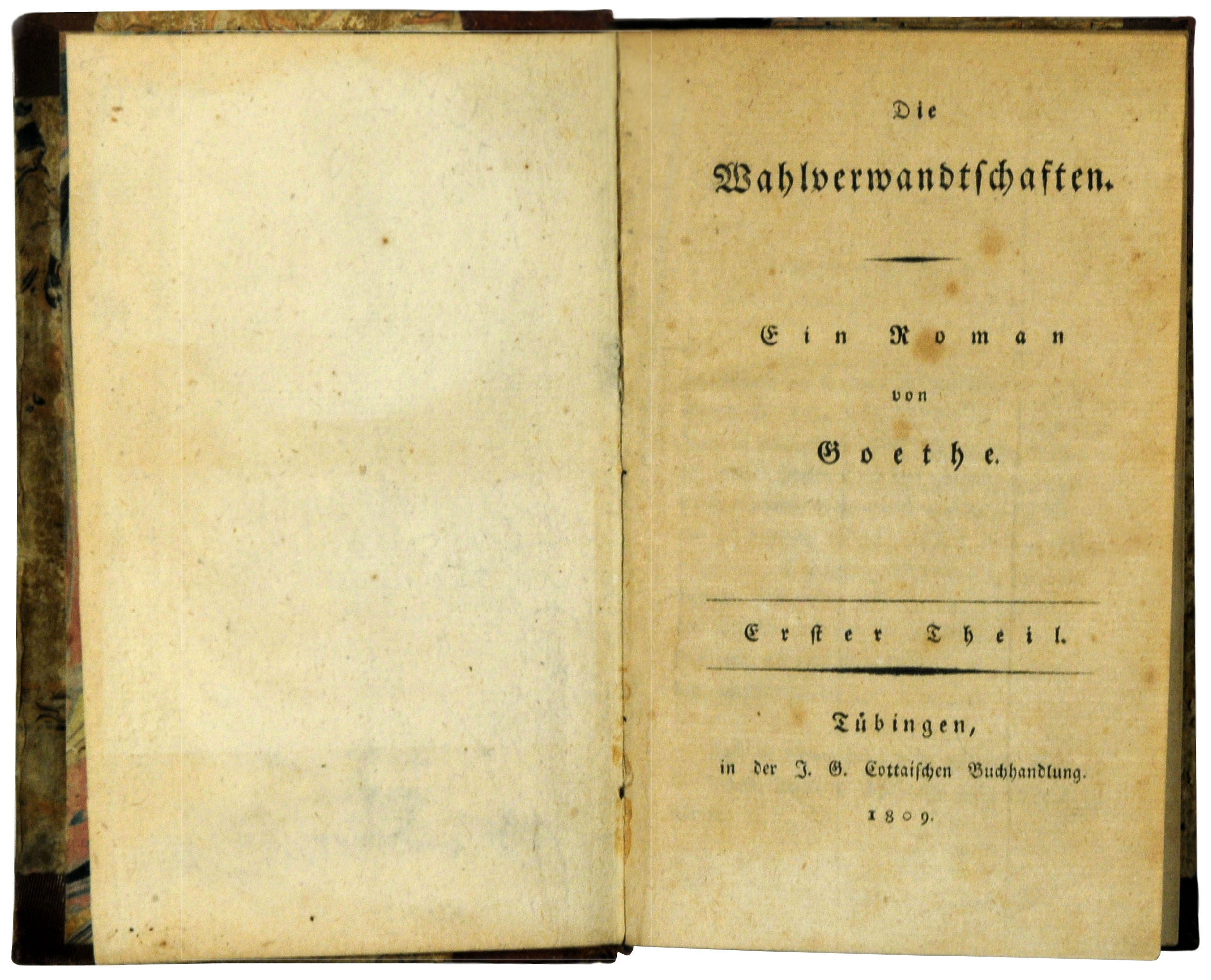 Titelblatt des Erstdruckes 1809